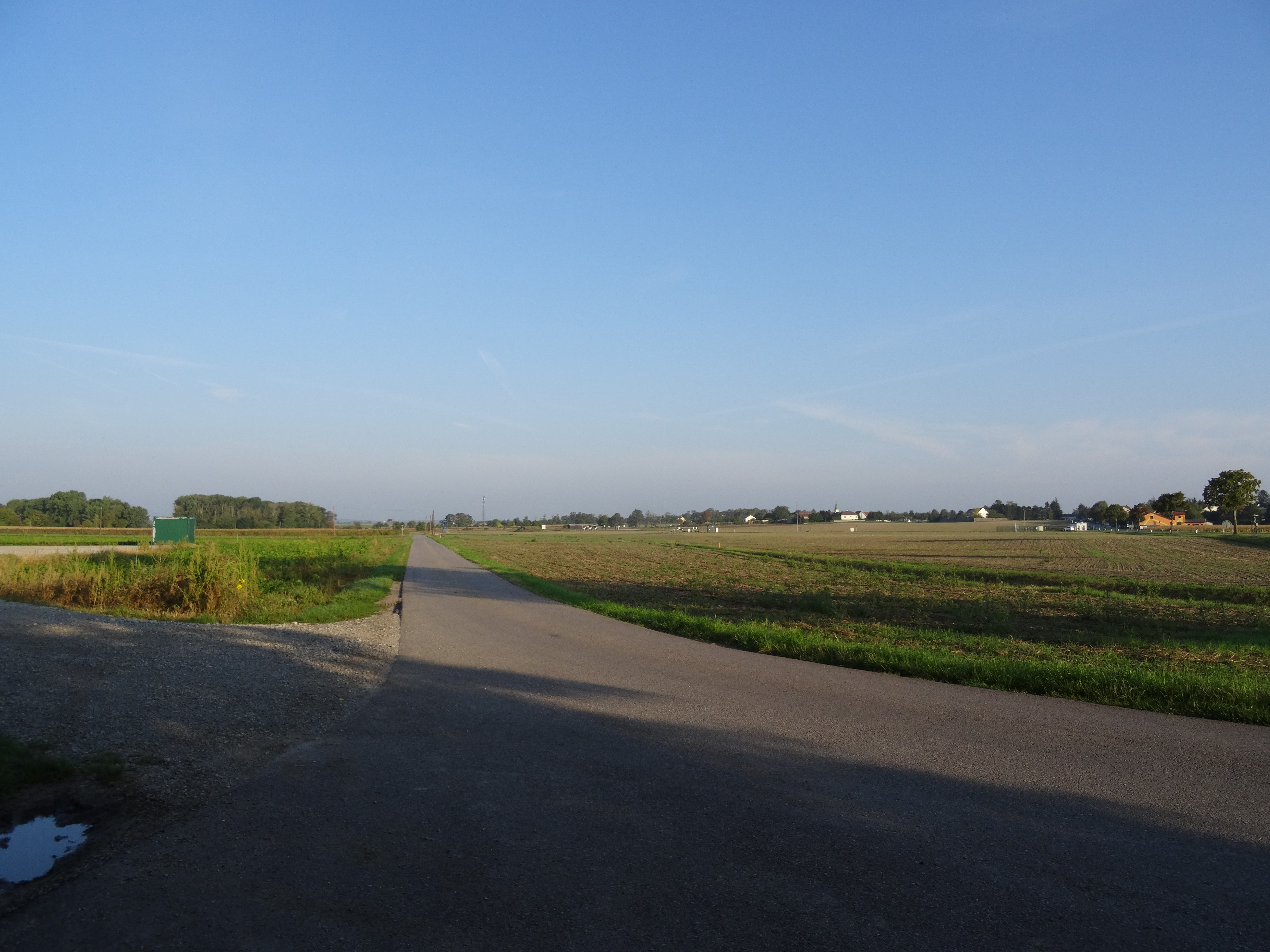 Landschaft im Weinviertel, Österreich.